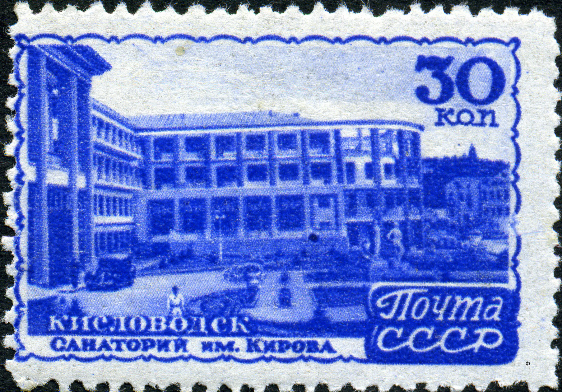 Марка СССР